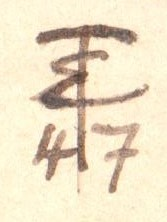 Hierbei handelt es sich um das Monogramm Eduard Trautweins, das er als Signatur für seine Bilder verwendete.